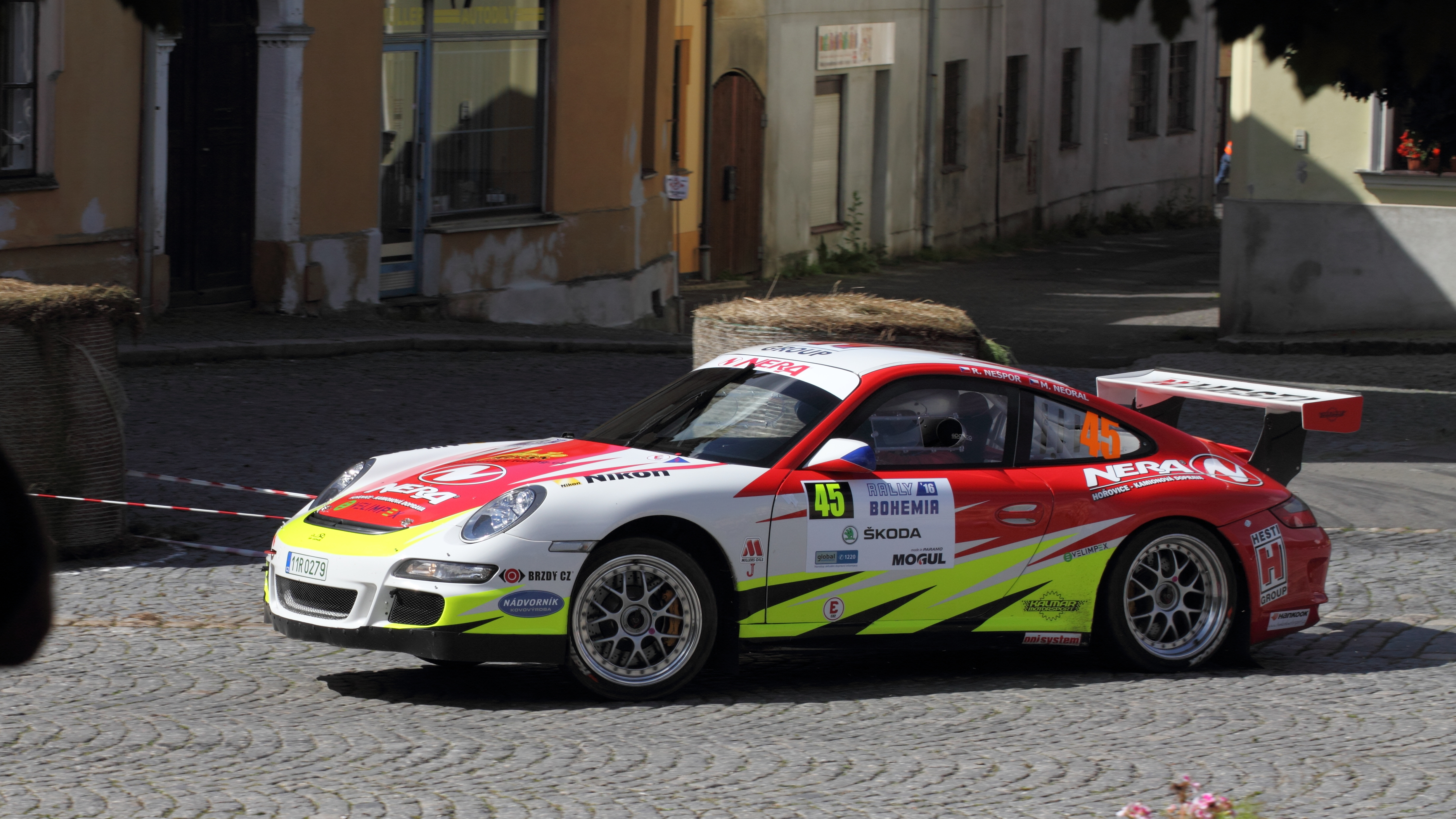 Nešpor Radoslav - Neoral Martin, Porsche 997 GT3, 43. Rally Bohemia (2016)